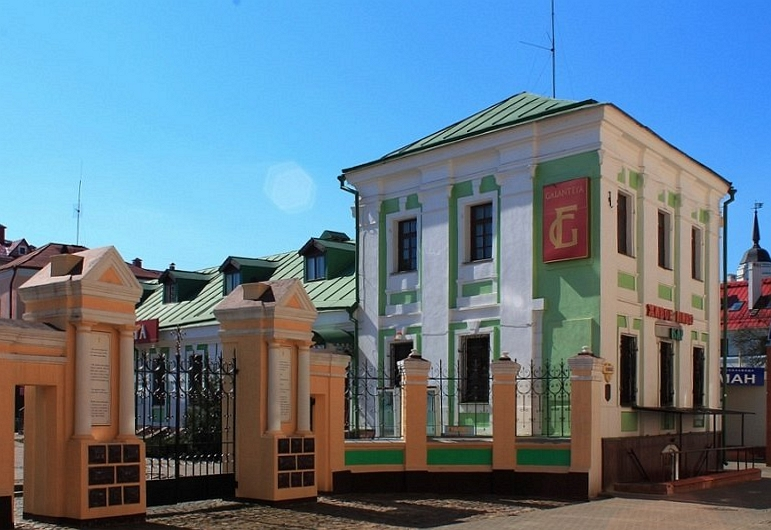 Правы флігель Архірэйскага падворка